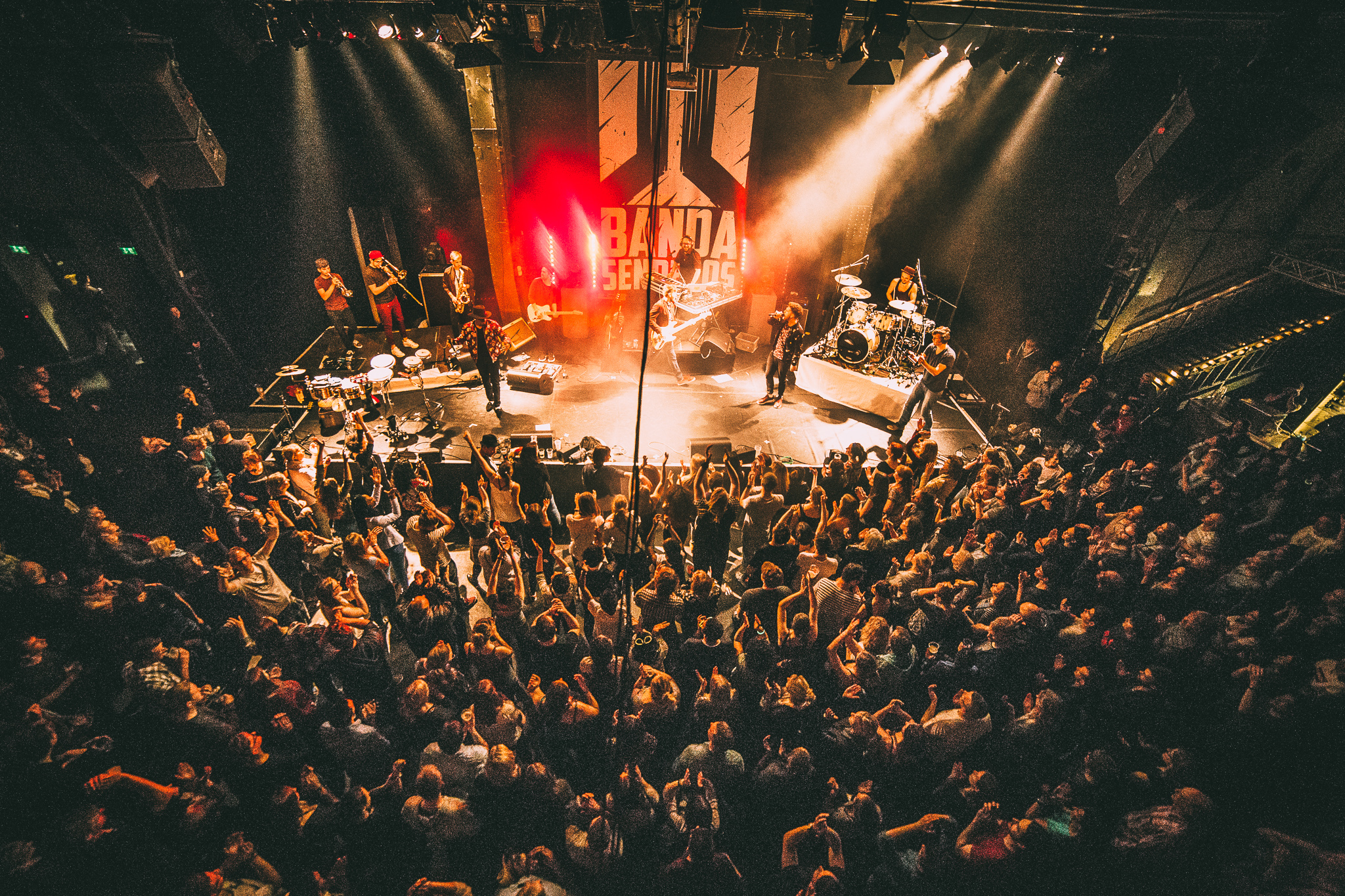 Banda Senderos Livekonzert in der Weststadthalle Essen am 22.April 2017